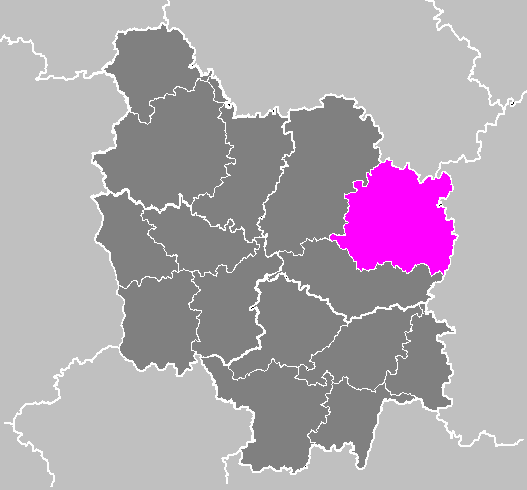 Maps of arrondissements and cantons of France: Arrondissement de Dijon.PNG (Région Bourgogne)